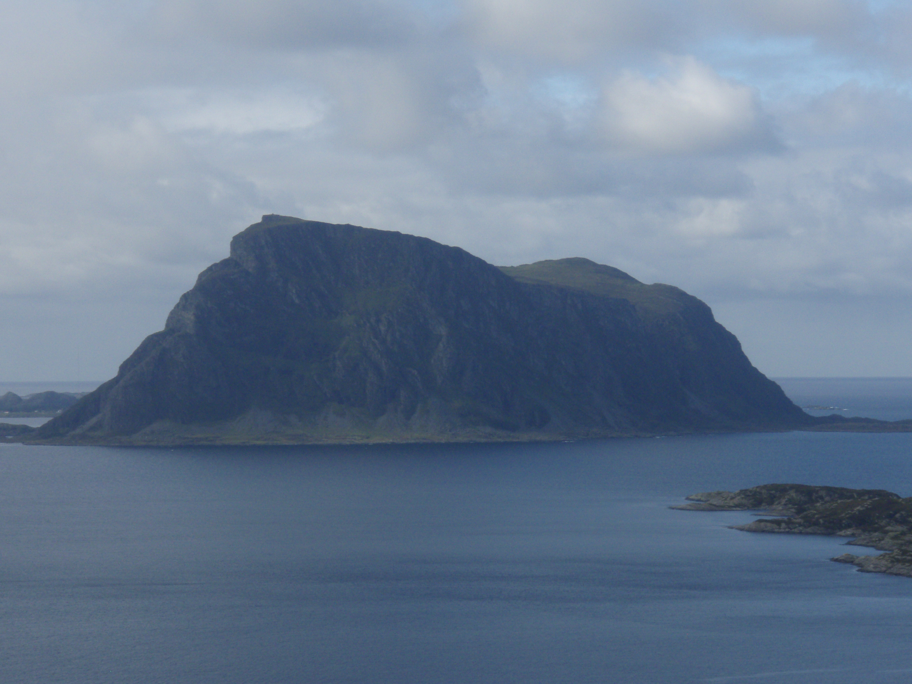 Øya Alden i Sogn og Fjordane